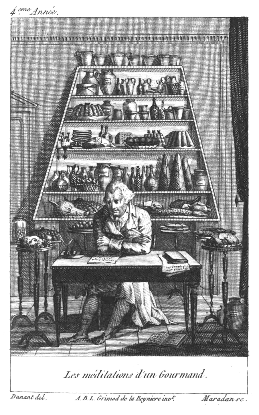 Alexandre Balthazar Laurent Grimod de la Reynière (Herausgeber). Almanach des gourmands, servant de guide dans les moyens de faire excellente chère. Par un vieil amateur. Titelblatt